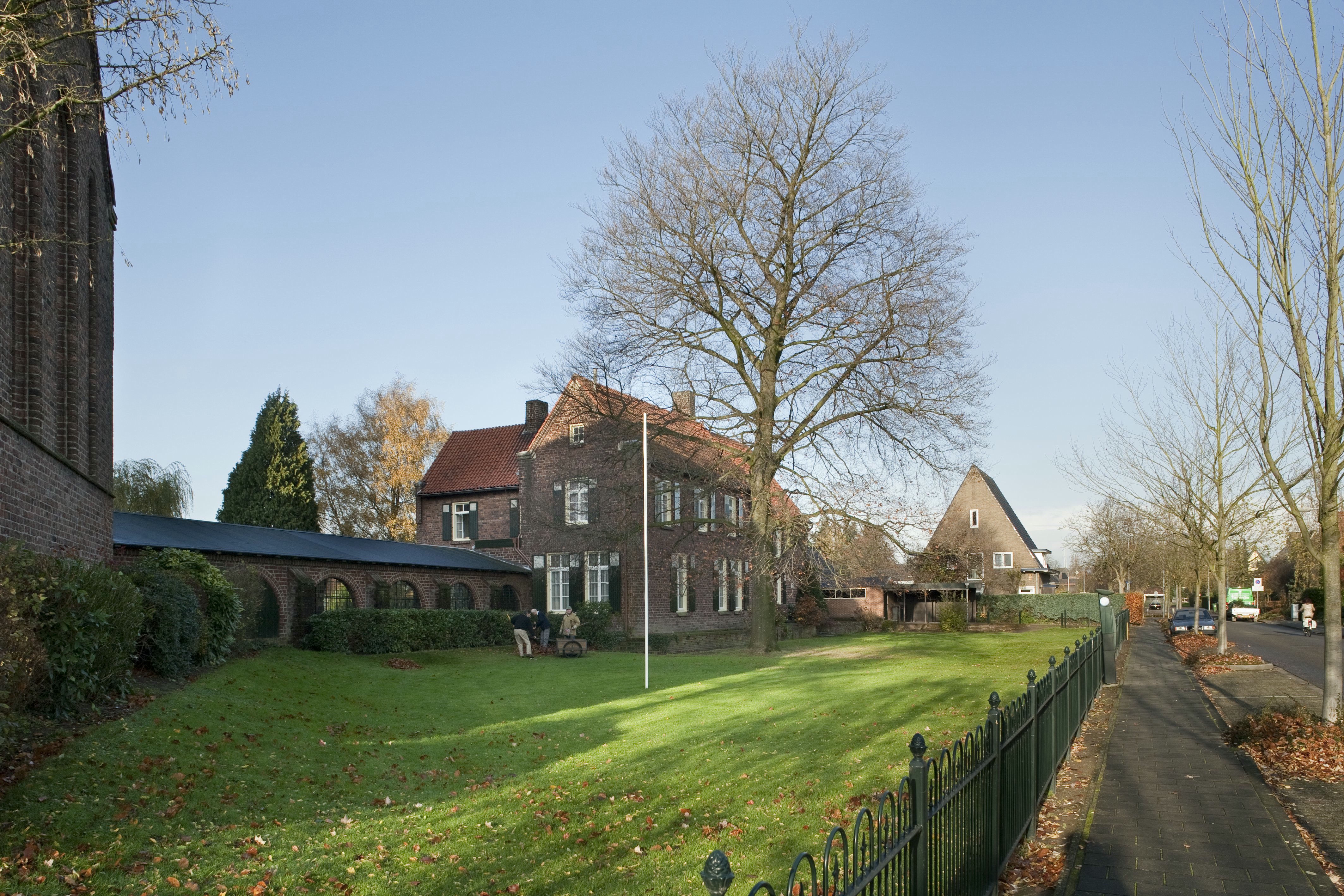 O.L. Vrouw ten Hemelopneming: Overzicht kerk met verbindingsgang naar de pastorie, met omgeving aan de Prins Bernhardstraat